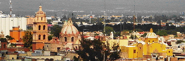 Cúpulas de las iglesias.